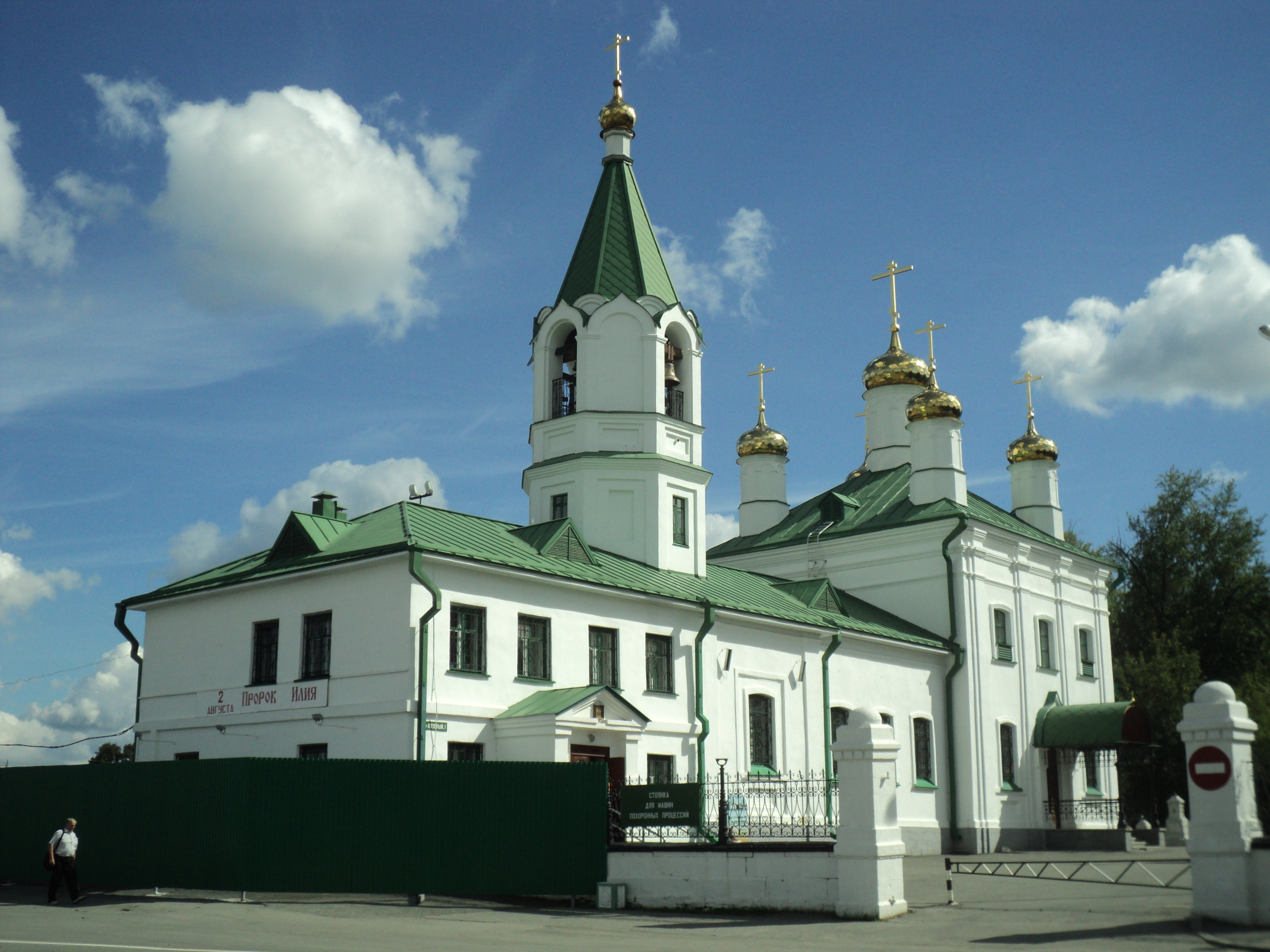 Здание Успенской Церкви (Свердловская область, Берёзовский, город Березовский)